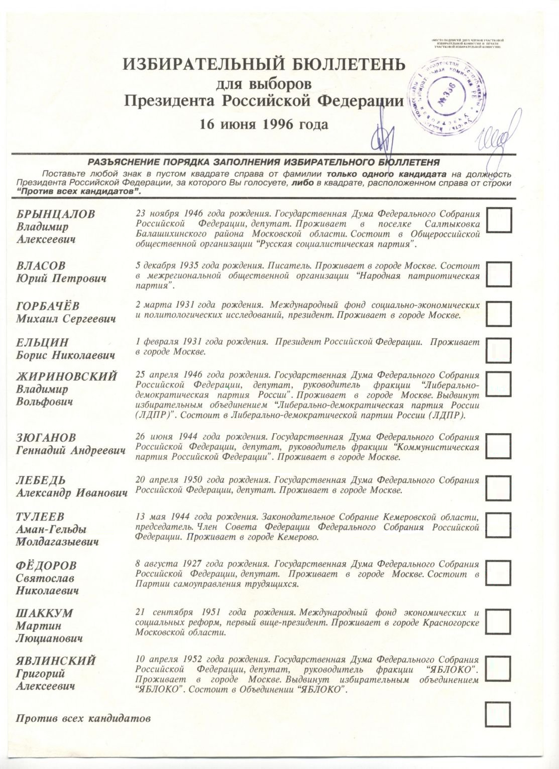 Избирательный бюллетень для голосования на выборах Президента Российской Федерации 16 июня 1996 года